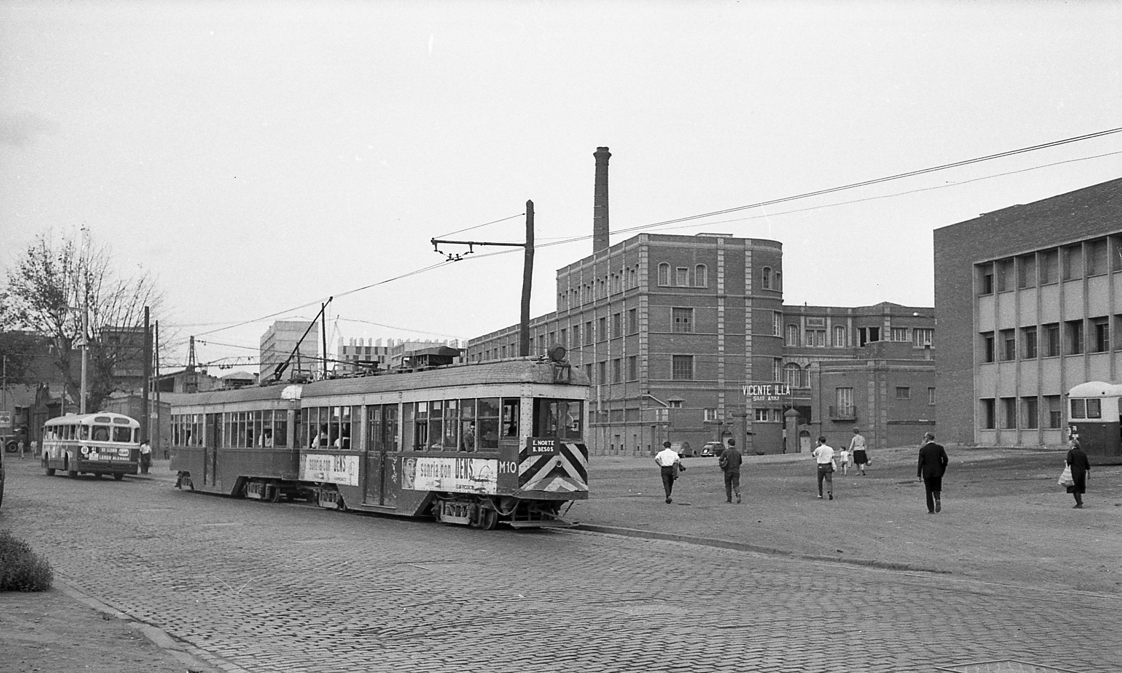 La composición de tranvías formada por el coche motor M10 y el remolque R10 en la calle Pedro IV de Barcelona en mayo de 1965, prestando servicio en la línea 70. A la derecha, el edificio de las cocheras de Puigcerdà.